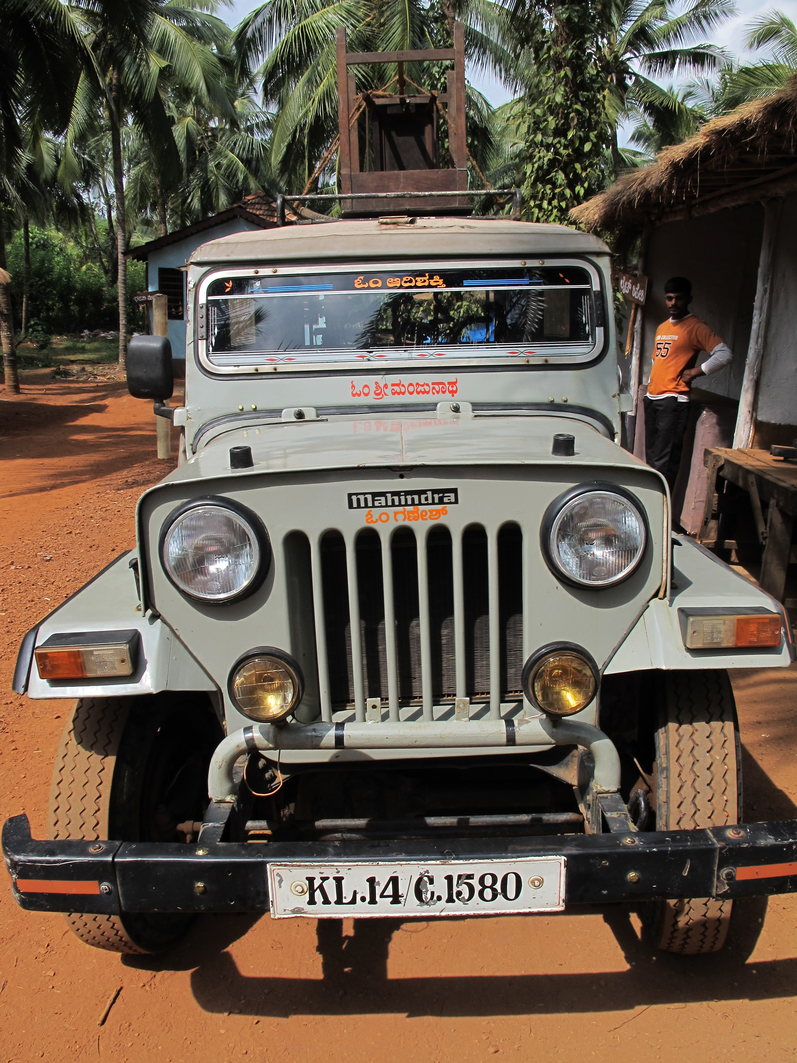 Indian jeep